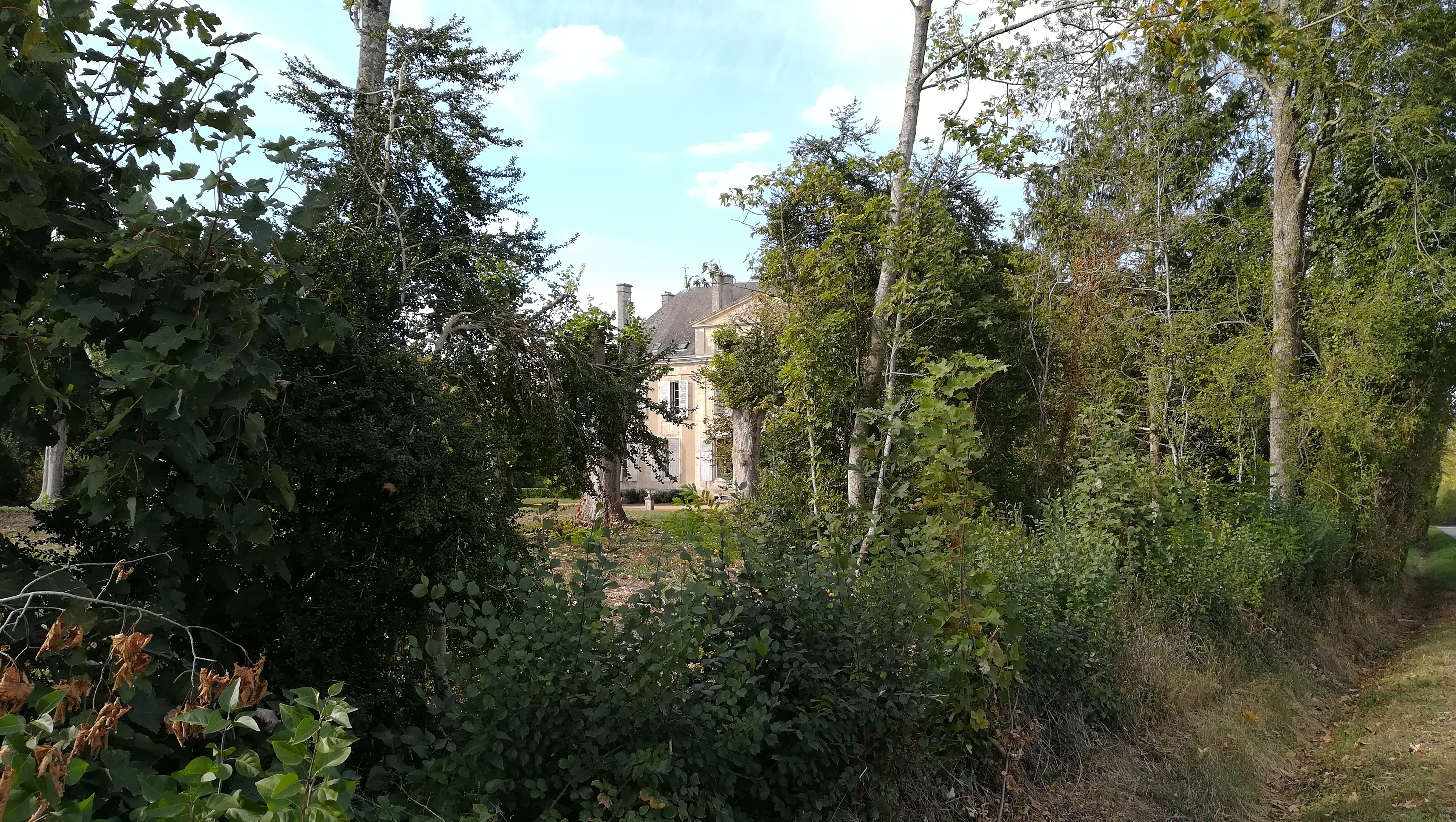 La Château des Joncherets, situé sur le territoire de La Mesnière, est une propriété privée. Il n'est pas visitable, sauf pendant les journées sur patrimoine.